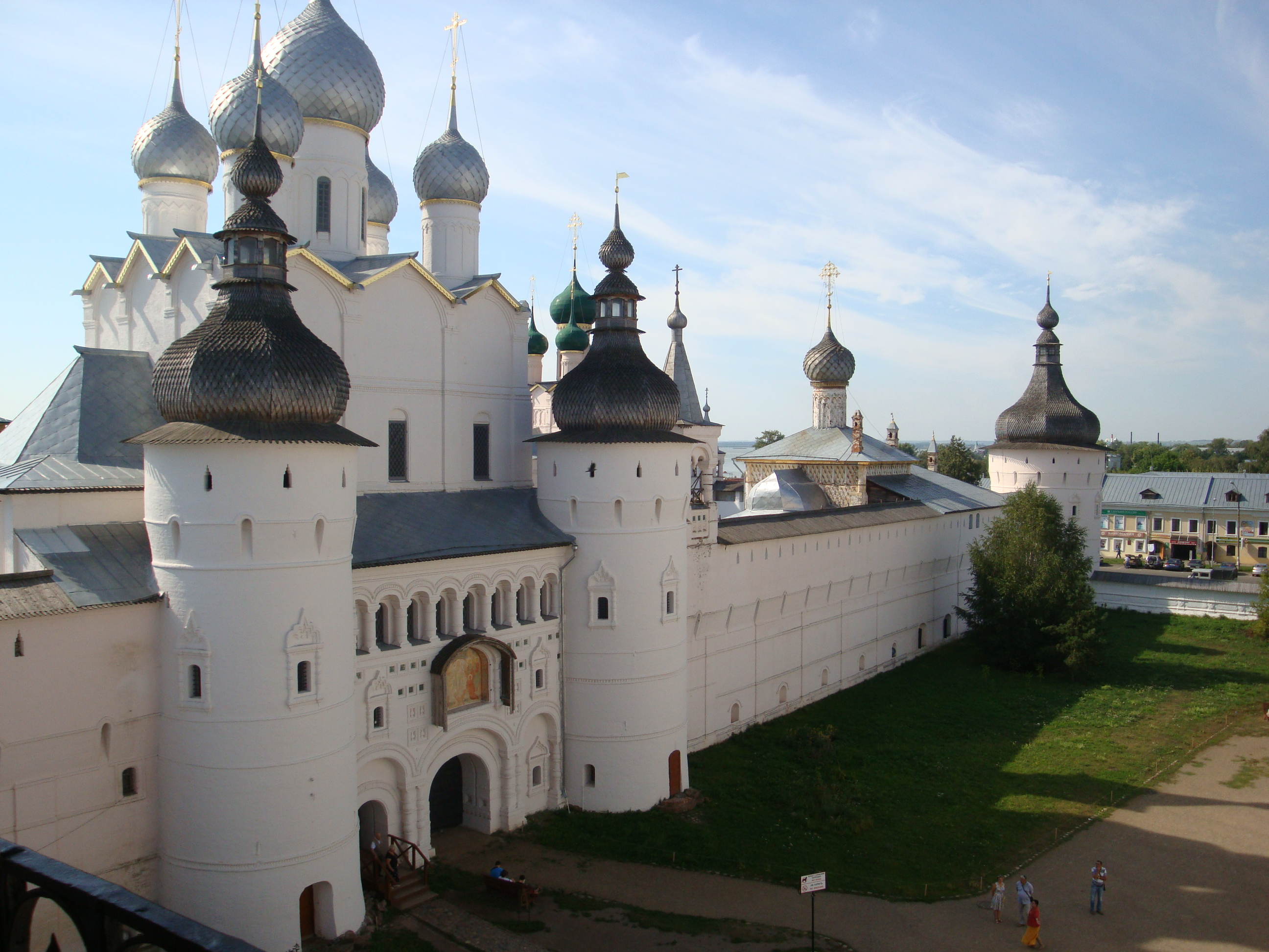 Ансамбль Ростовского Кремля (Ярославская область, Ростов, центр города)